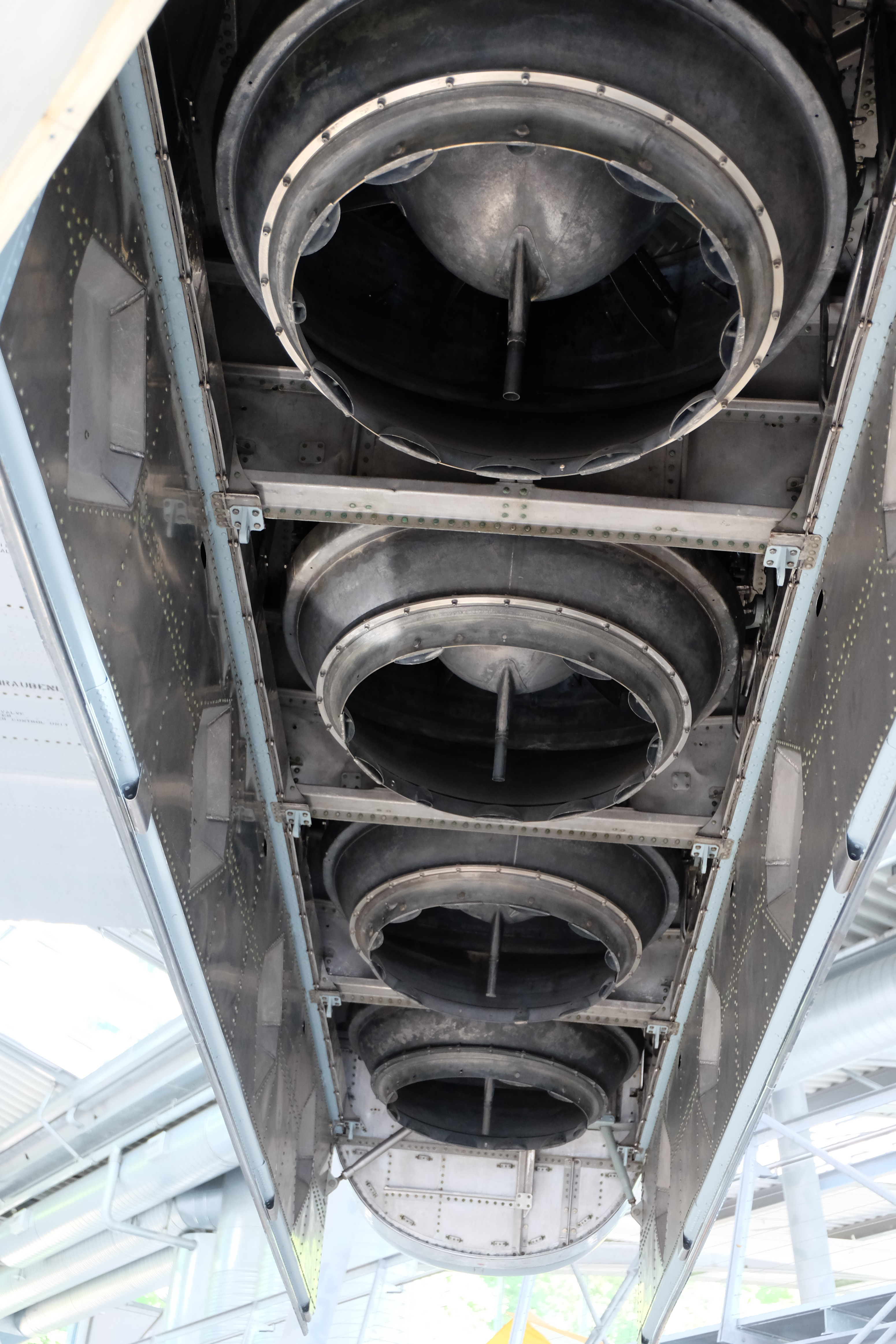 Zeigt die Hubtriebwerke in der Gondel auf der linken Flugzeugseite. Aufgenommen in der Flugwerft Schleißheim.